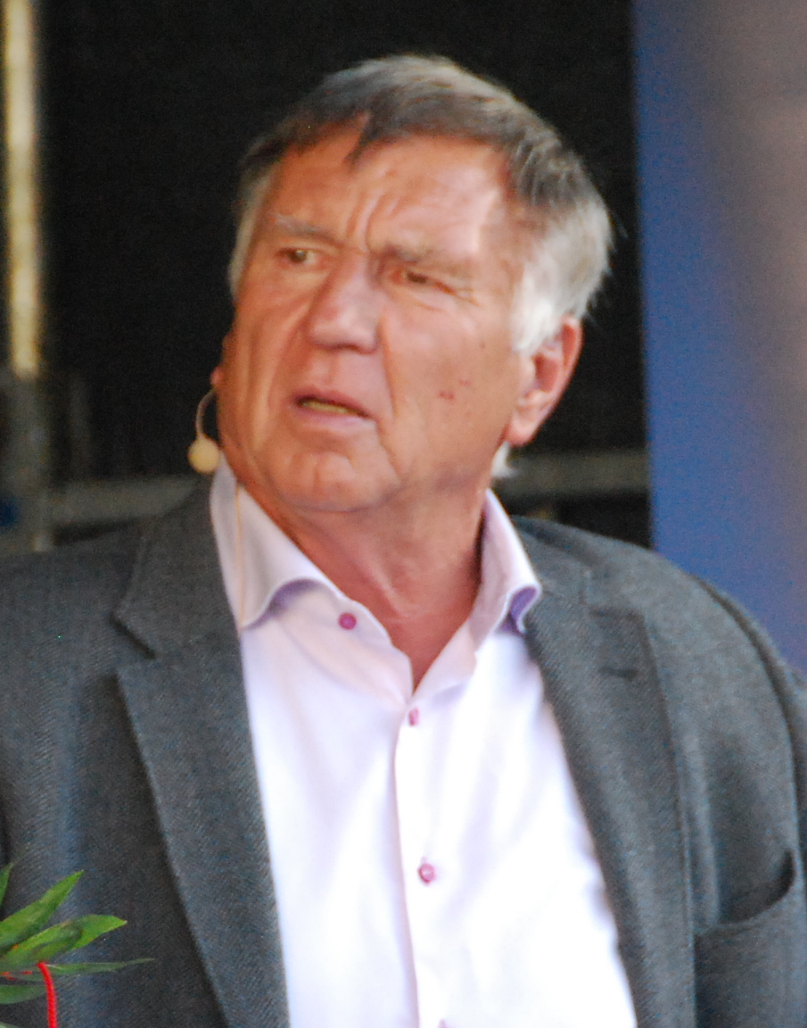 Den tidligere fodboldtræner Sepp Piontek. Her i forbindelse med et arrangement før U-21 Europamesterskabet i fodbold 2011 i Viborg.